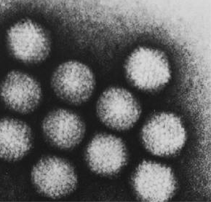 Adenoviren im Transmissions-Elektronenmikroskop ID#: 237 Description: Transmission electron micrograph of adenovirus Copyright Restrictions: None - This image is in the public domain and thus free of any copyright restrictions. As a matter of courtesy we request that the content provider be credited and notified in any public or private usage of this image.